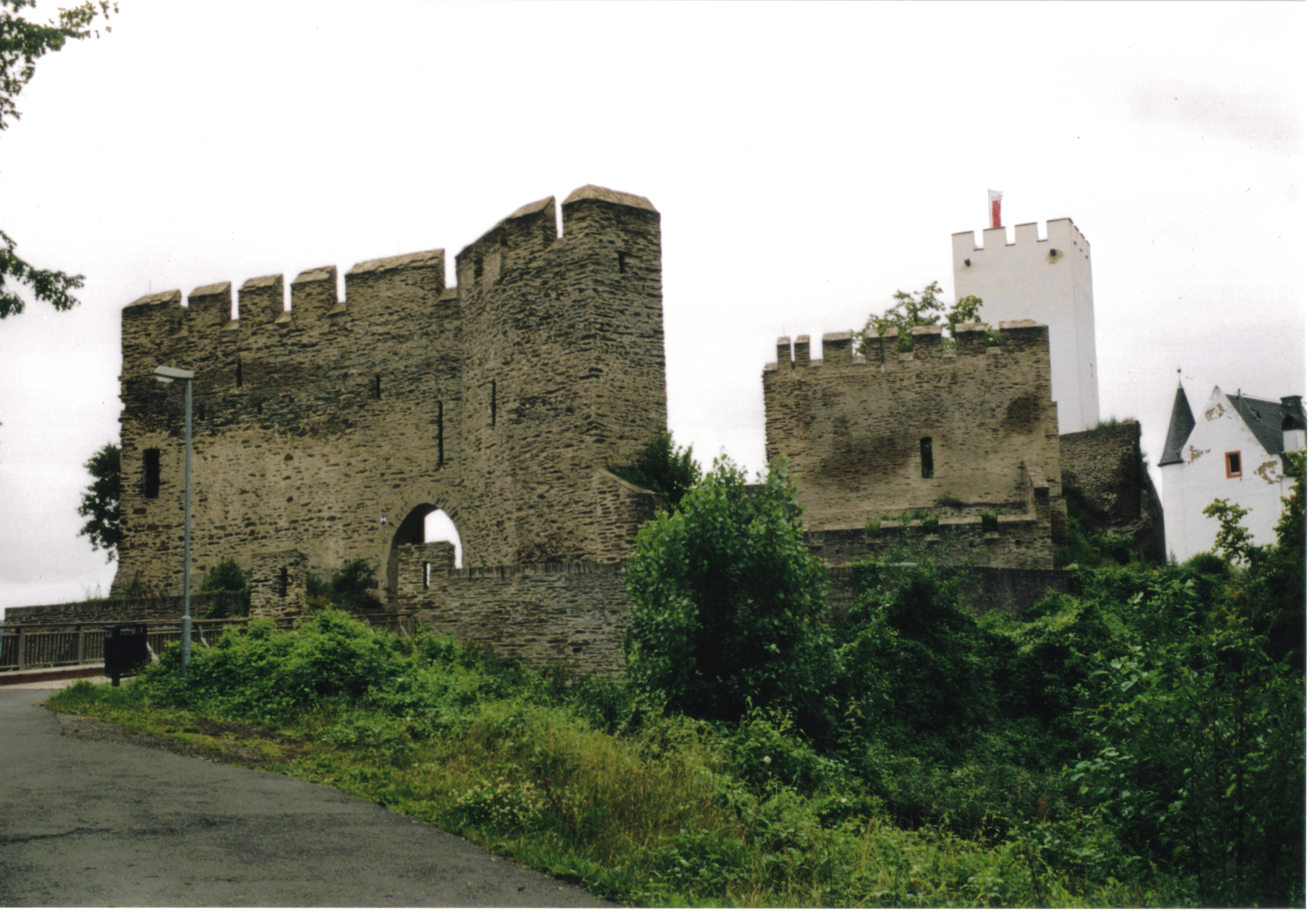 Burg Sterrenberg mit den beiden Schildmauern eigenes Foto Peter Weller 2004